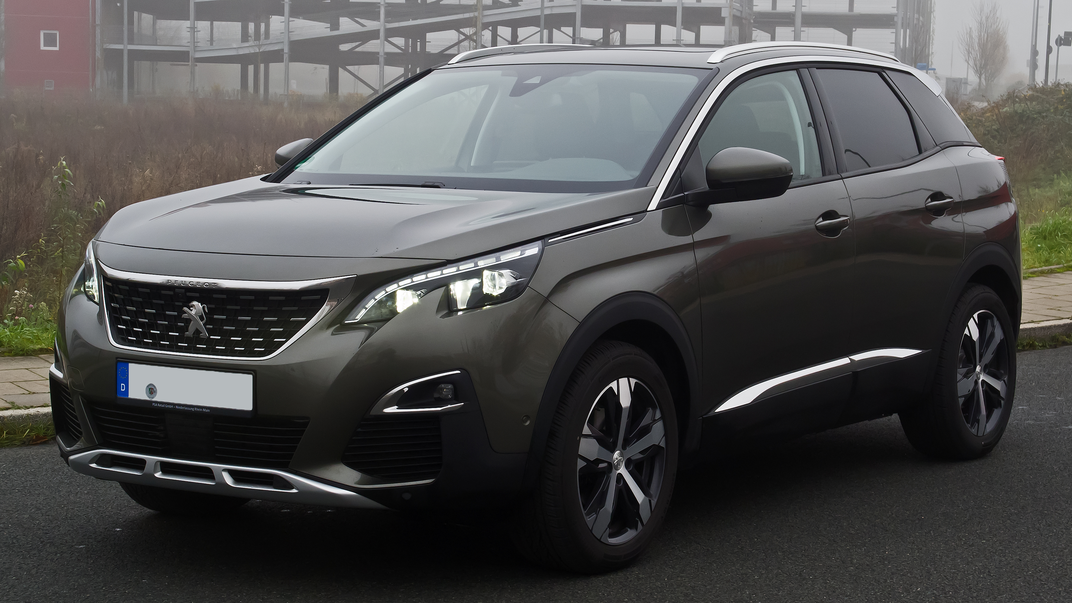 Peugeot 3008 BlueHDi 150 Allure (II)